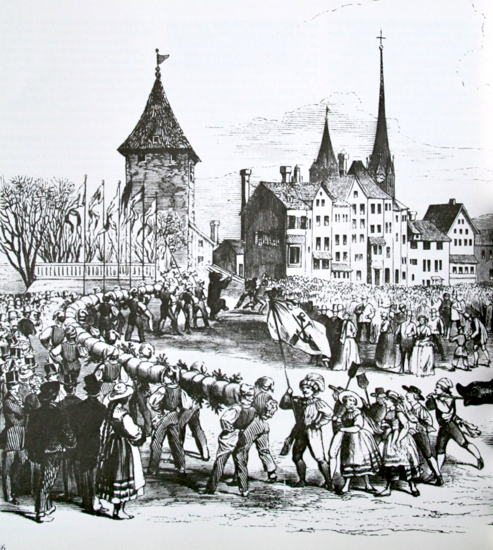 Sechseläuten Sechseläuten im Kratzquartier 1854